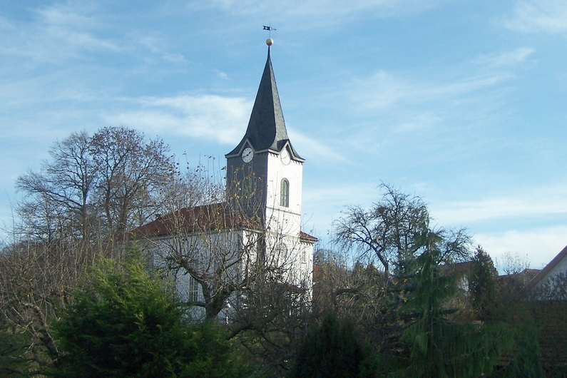 Teilansicht der Kirche